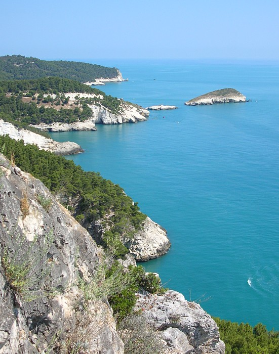 De kust van de Gargano nabij Vieste Eigenwerk